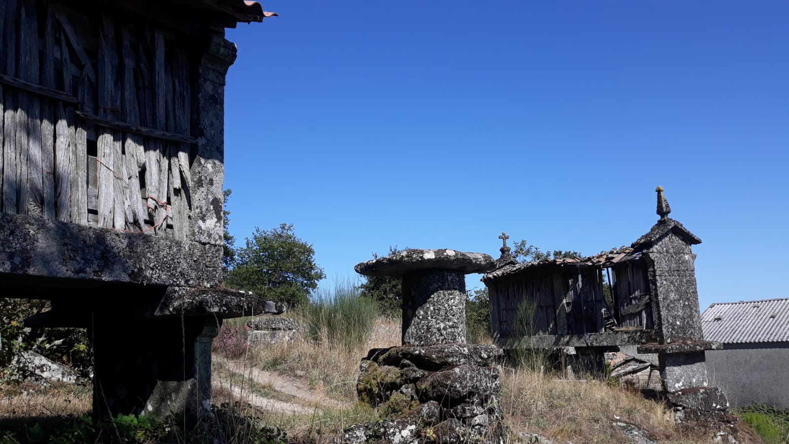 Restos de hórreos en Vilar do Monte, Aguada, Carballedo, Lugo, Galicia